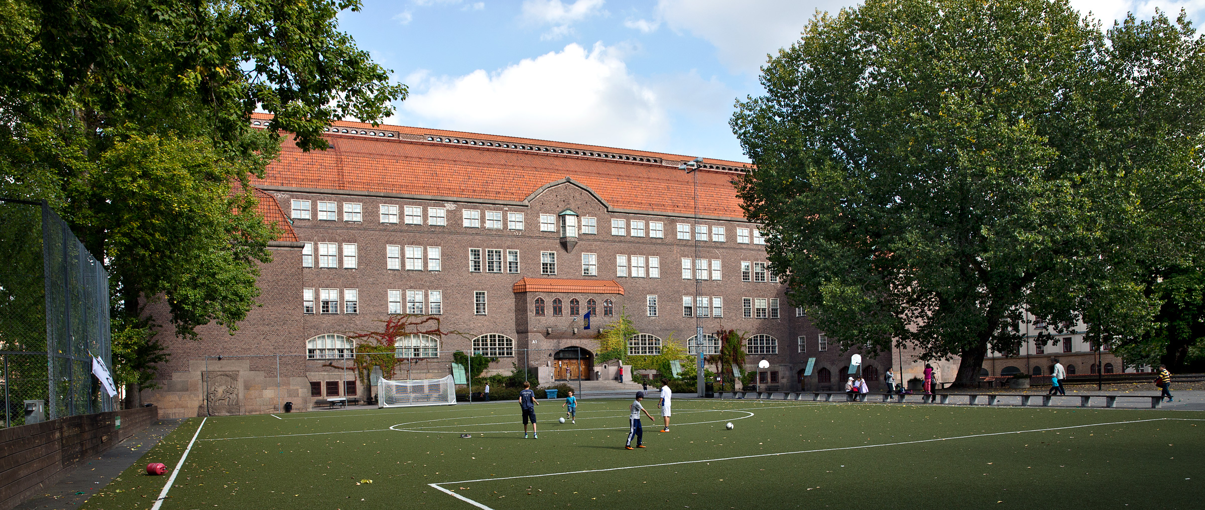 Östra Real på Karlavägen 79, Stockholm